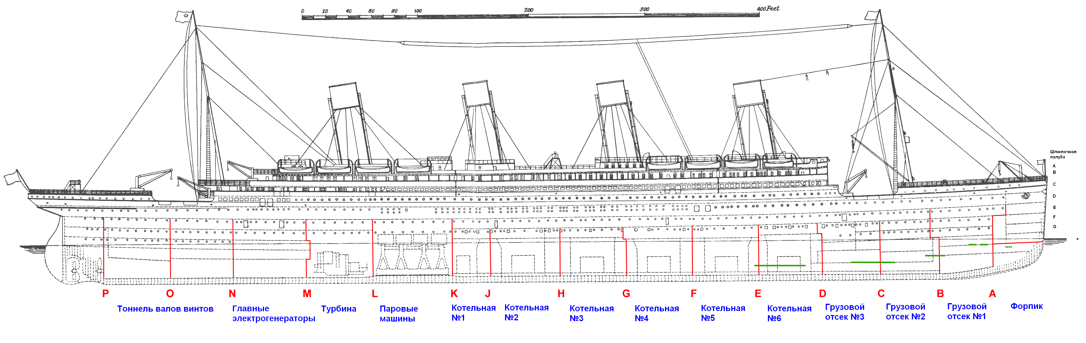 Правый борт «Титаника»